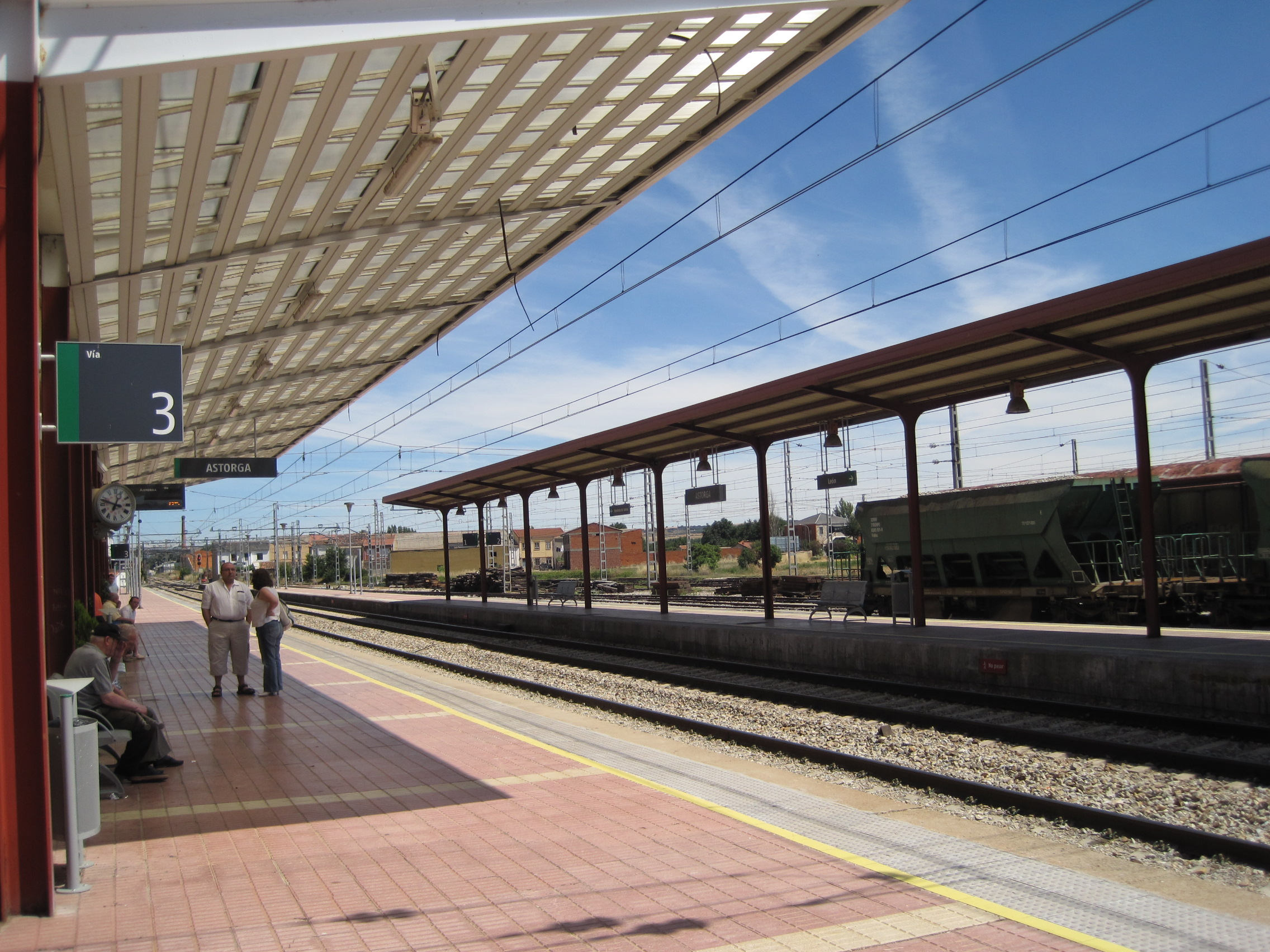 Andenes de la estación de ferrocarril de Astorga (provincia de León, España).